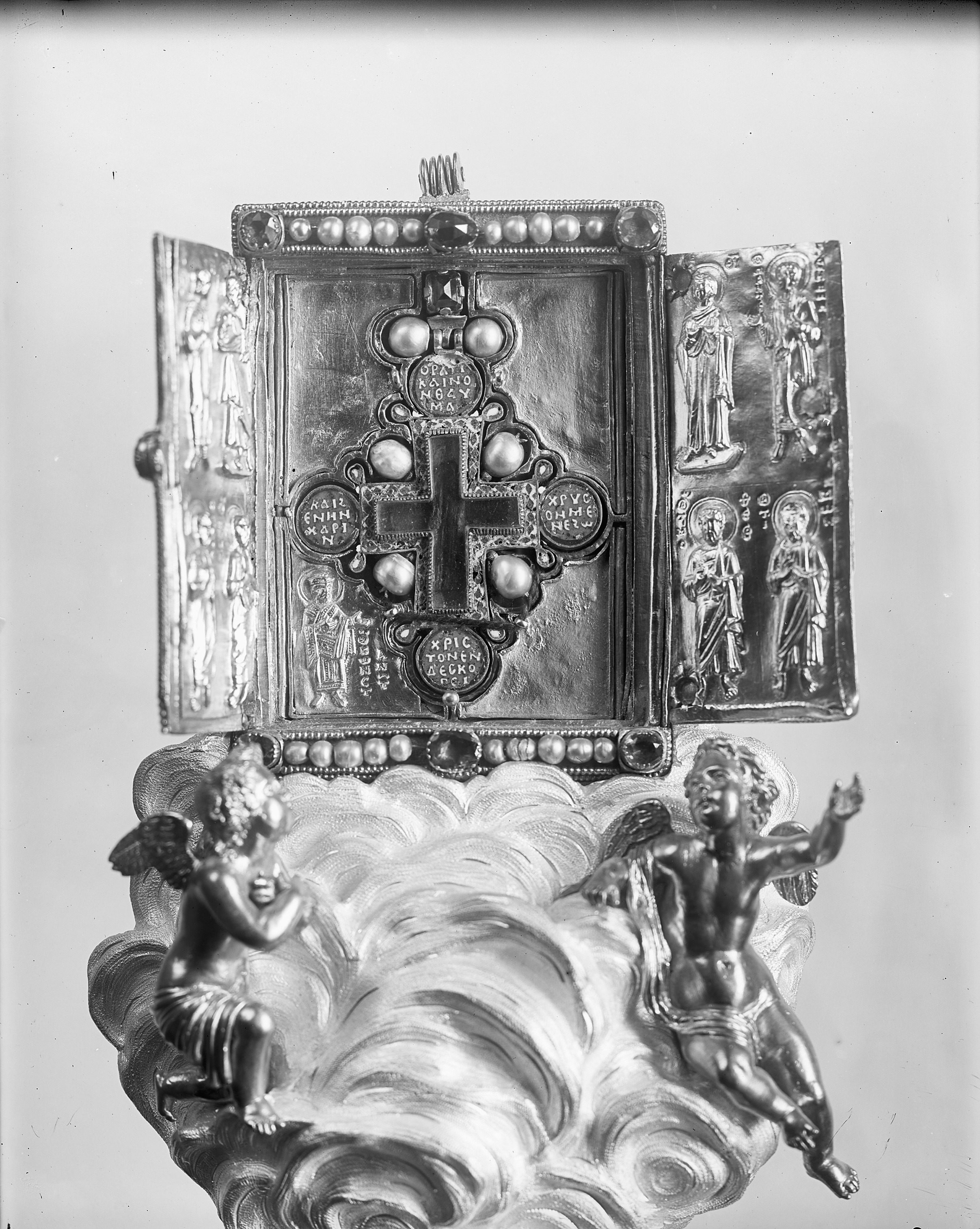 "Kruisje van Constantijn", van ca. 1204 tot 1837 in de schatkamer van de Onze Lieve Vrouwekerk in Maastricht, thans in de schatkamer van de Basiliek van Sint-Pieter te Rome (Vaticaanstad)